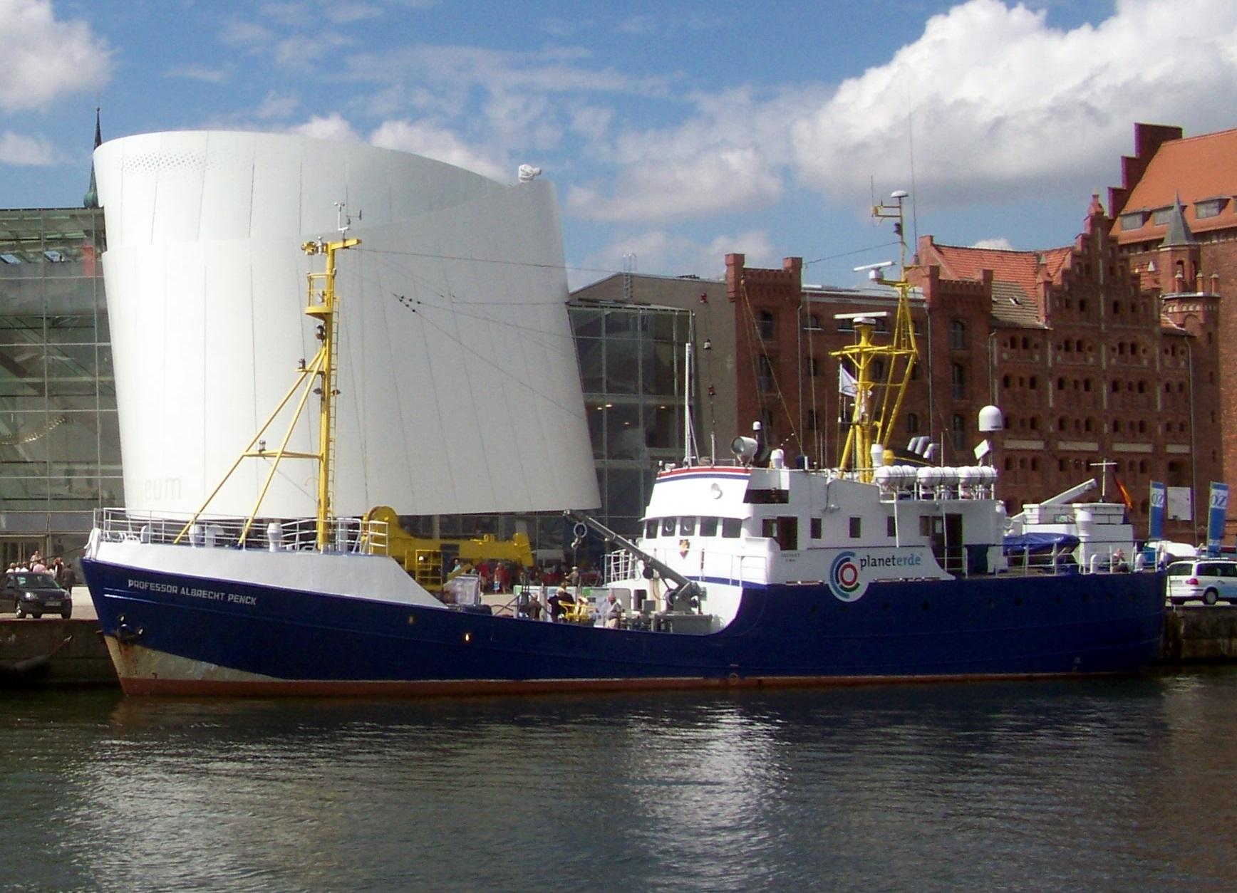 Das Forschungsschiff Professor Albrecht Penck vor dem Ozeaneum Stralsund.